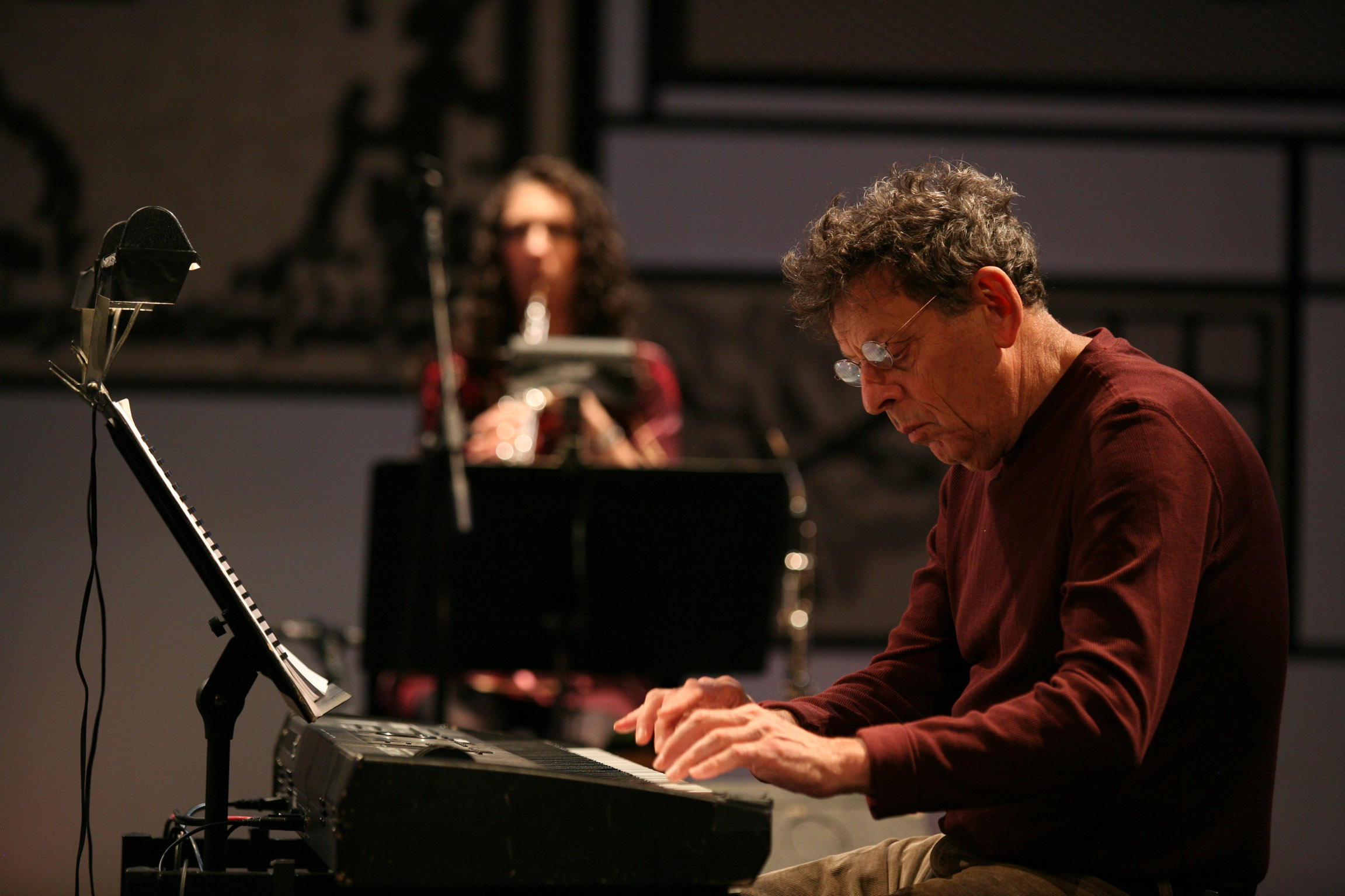 Milano, Teatro degli Arcimboldi. Philip Glass - Book of Longing. Immagini di Leonard Cohen ©Lelli e Masotti